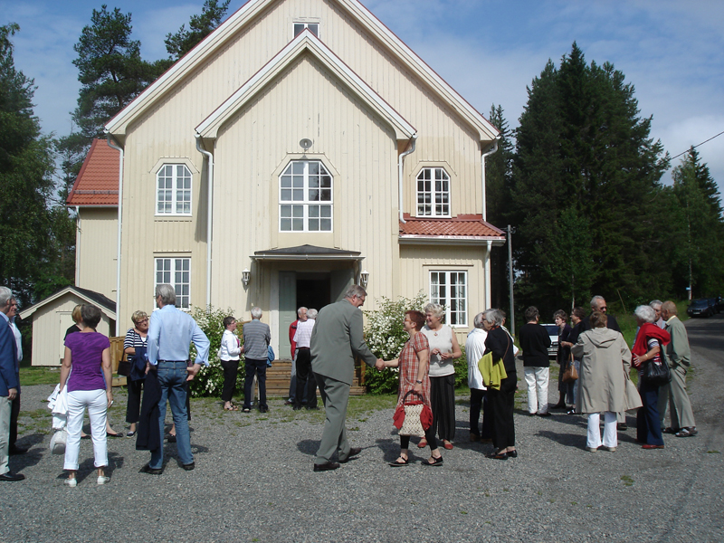 Kyrkhelg i Ragvaldsträsk